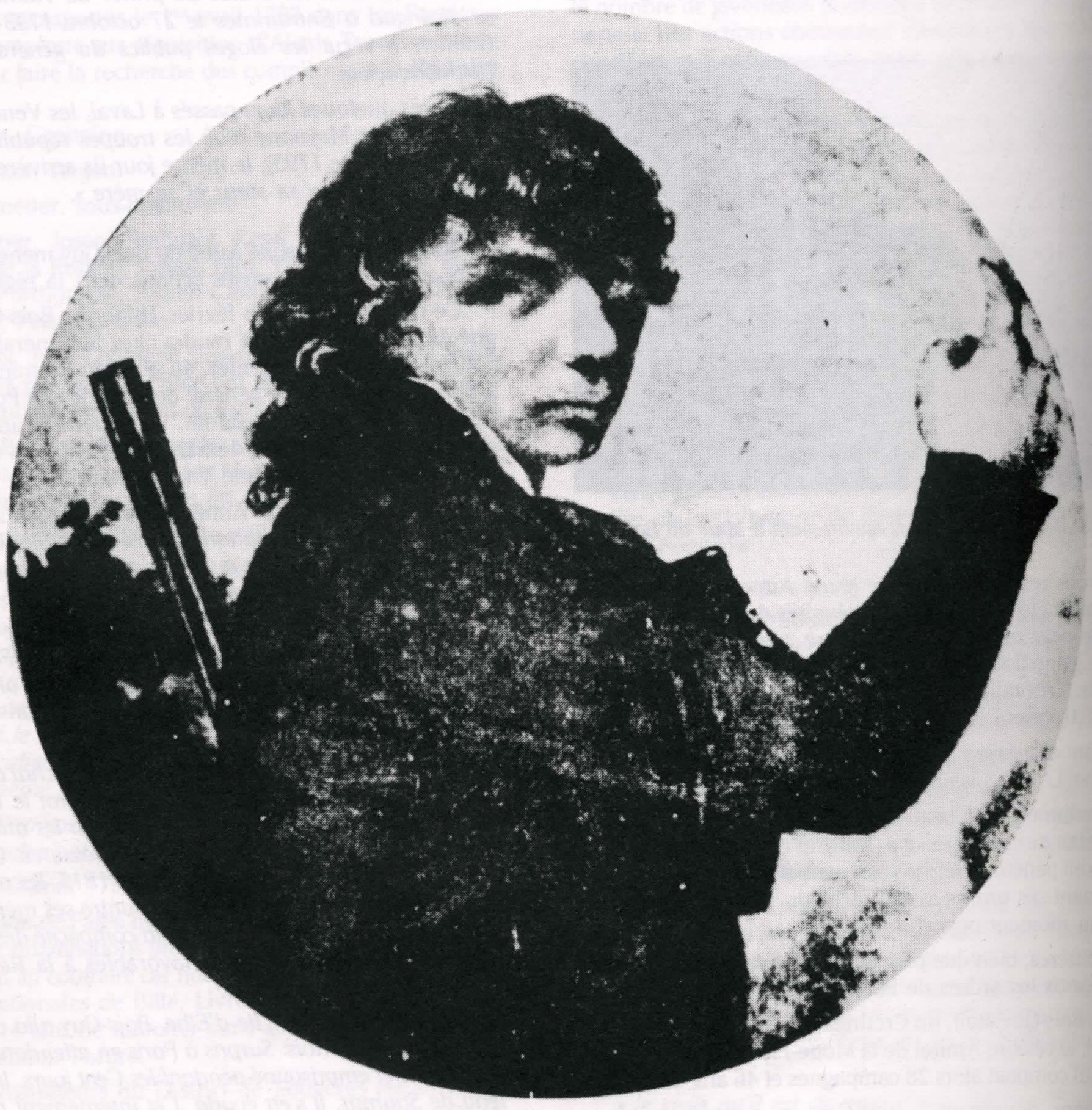 Aimé Picquet du Boisguy (1776-1839)